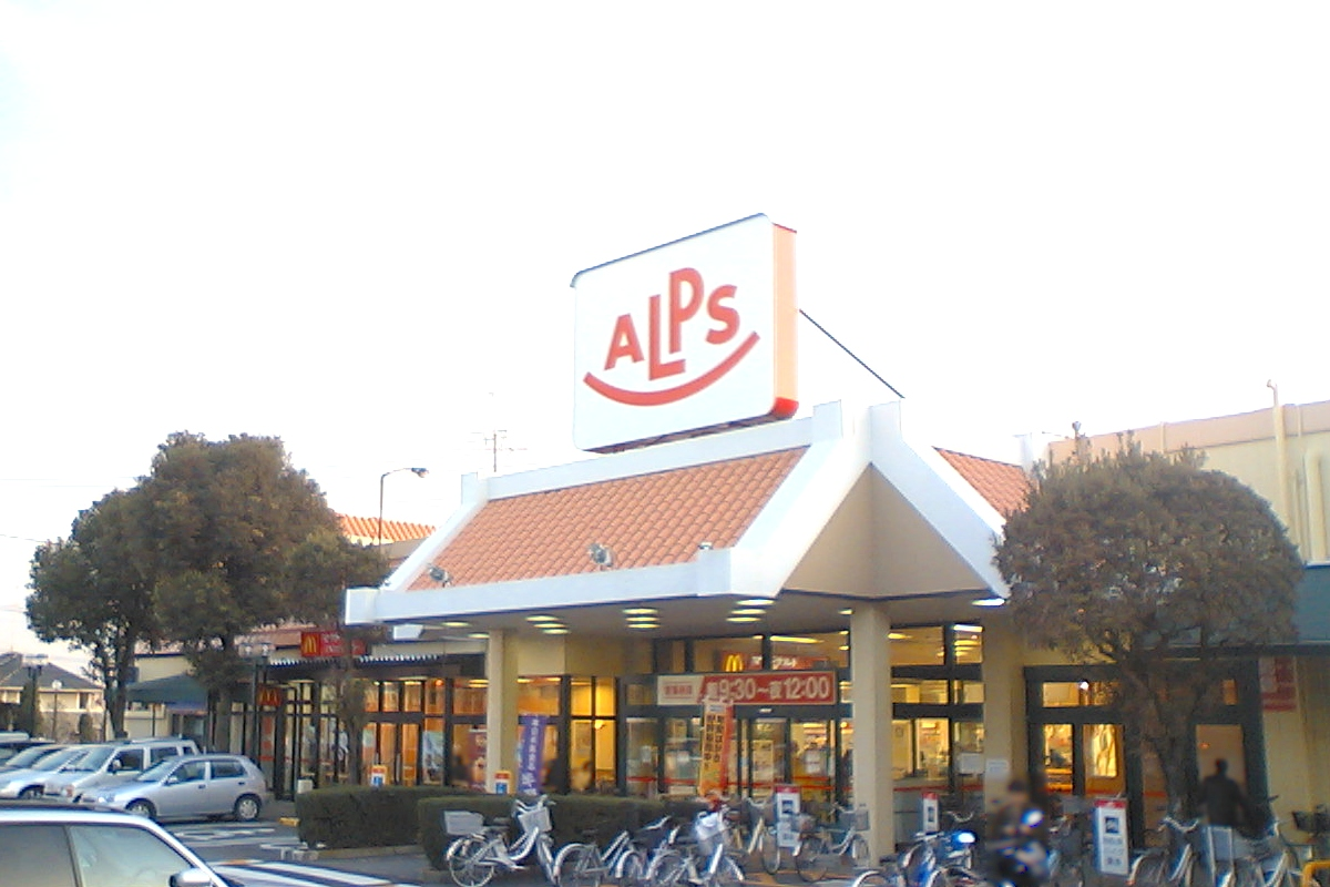 Supermarket ALPS Hazama store(Hachioji-shi, Tokyo, Japan)